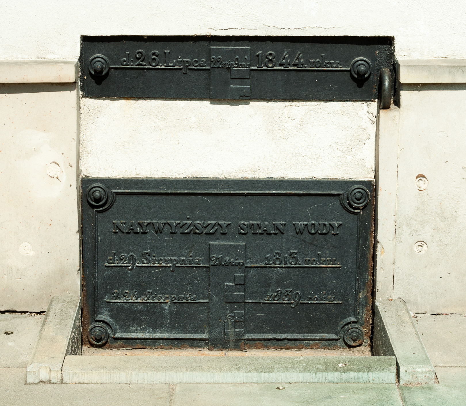 Tablica na ścianie filaru dawnej Komory Wodnej w Warszawie na Pradze Północ z zaznaczonymi poziomami wód Wisły podczas rekordowych powodzi. Tekst: d:26.Lipca 22stóp9cali 1844. roku. NAYWYŻSZY STAN WODY d:29.Sierpnia 21.Stóp 1813. roku. d:28.Sierpnia 1839. roku. [nieczytelny znak, może 6]